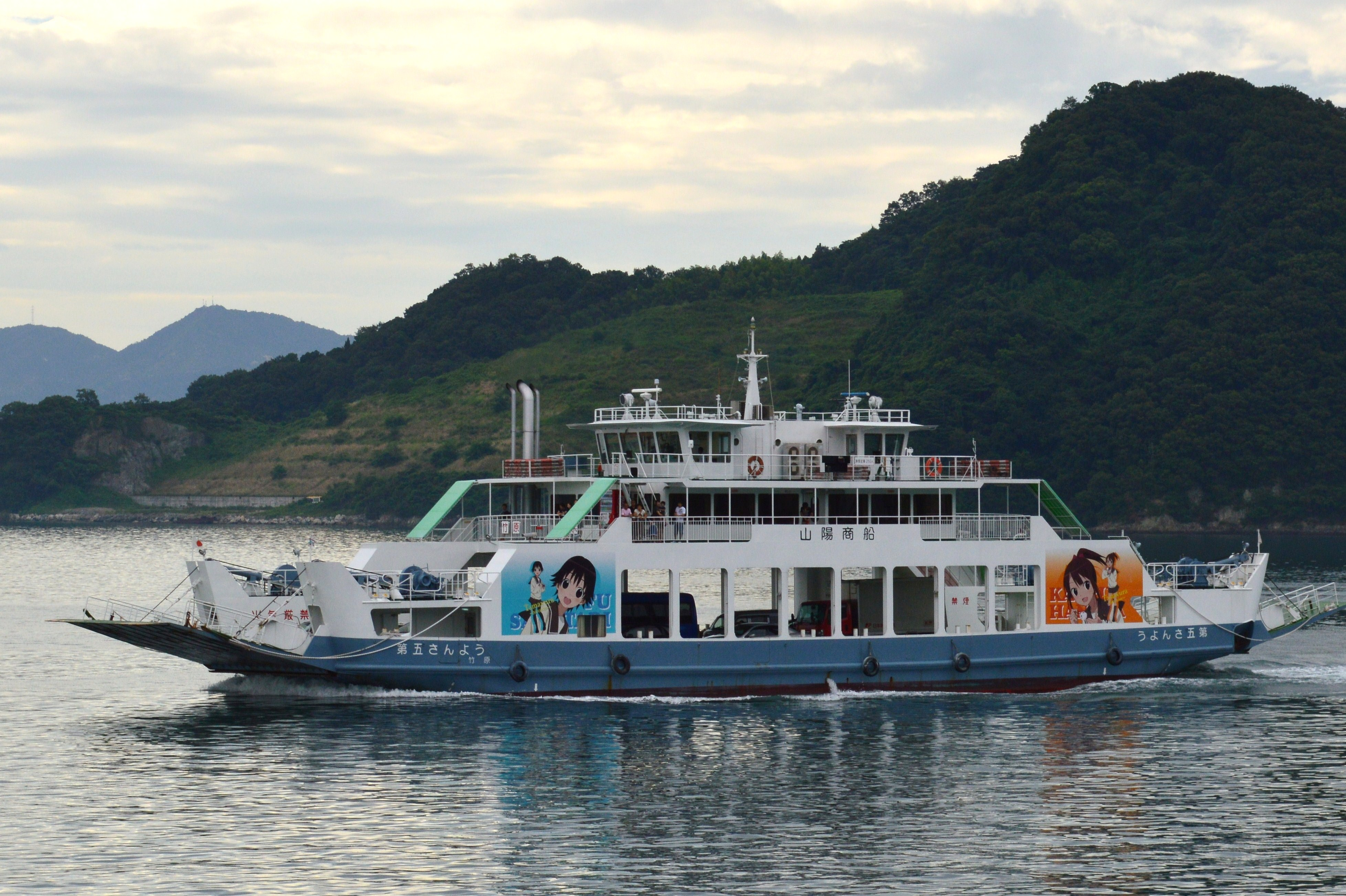 山陽商船が竹原港-大崎上島（垂水港/白水港）館で運航する船、側面にアニメ「たまゆら」のキャラクターが描かれたたまゆらっぴんぐフェリー